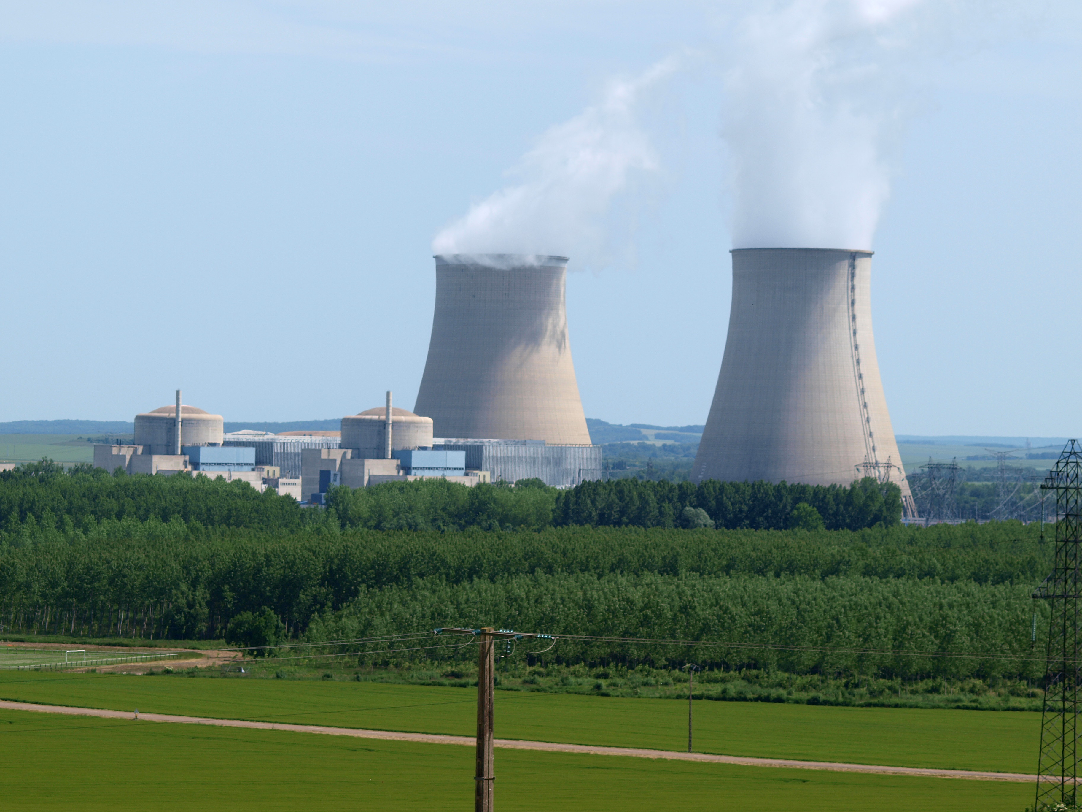 Nogent-sur-Seine (Aube, France) , la centrale nucléaire.